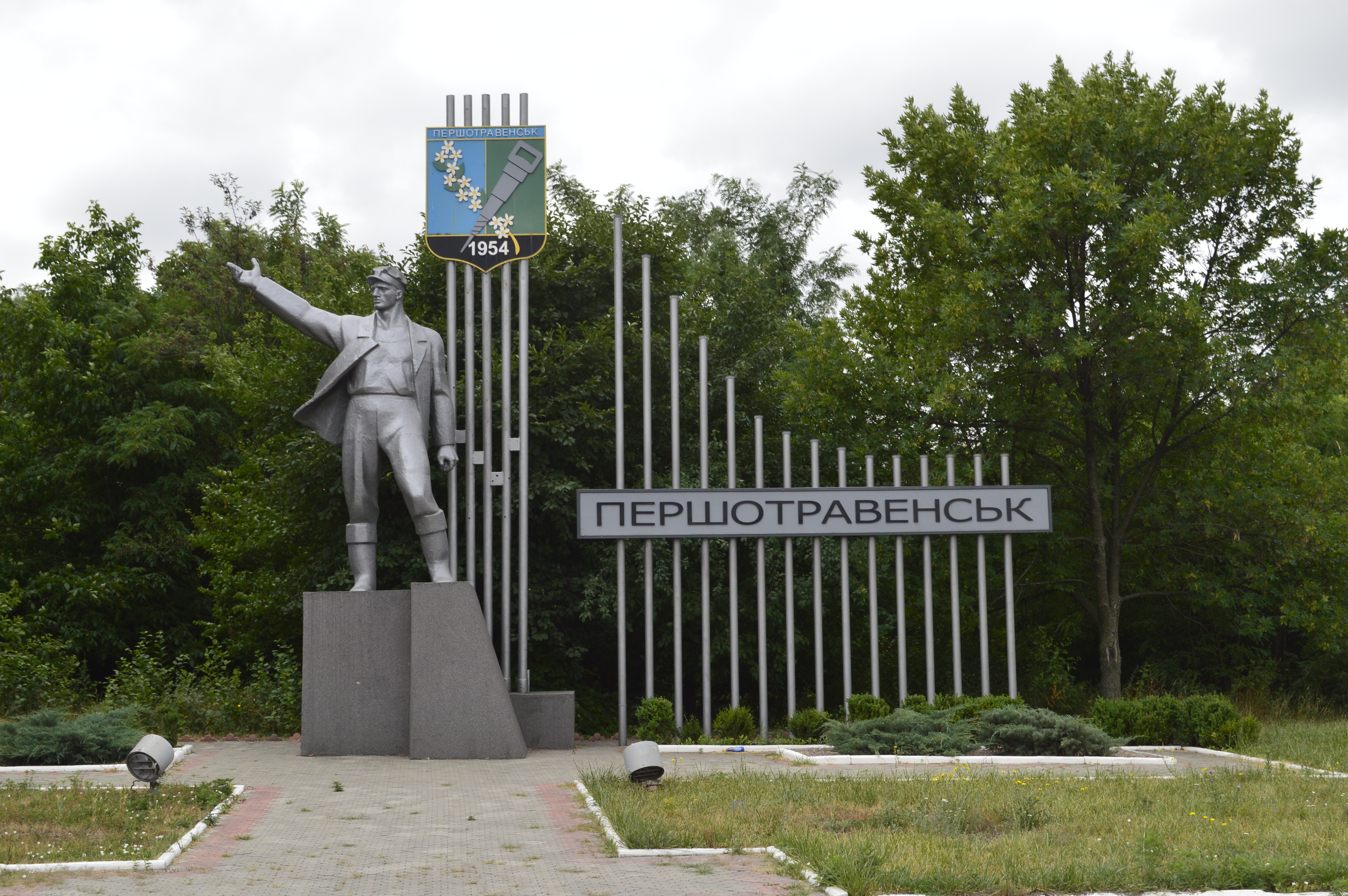 Pershotravensk shakhtari monument.jpg